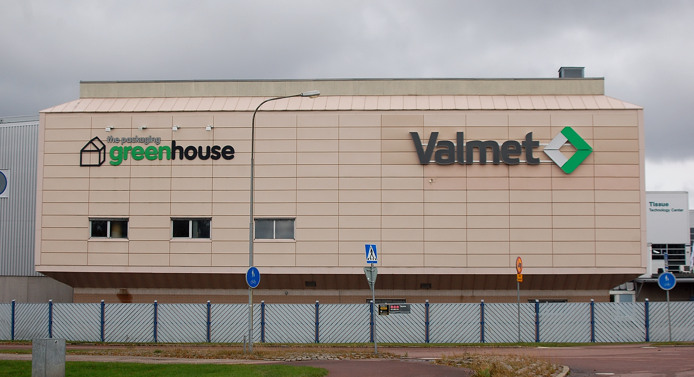 Valmet Greenhouse Lamberget, Karlstad